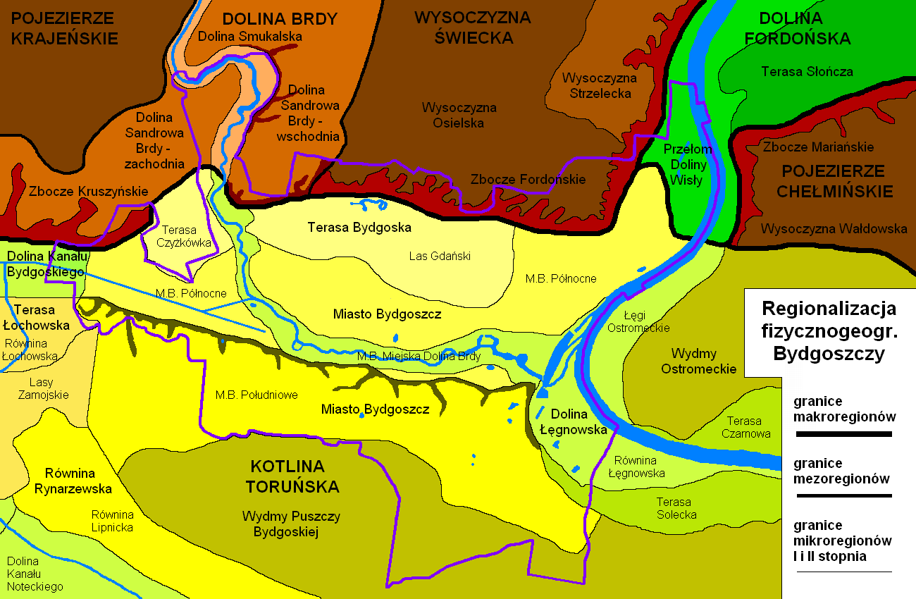 Regionalizacja fizycznogeograficzna Bydgoszczy - makro-, mezo- i mikroregiony I i II stopnia na podstawie "Środowisko przyrodnicze Bydgoszczy, red. J. Banaszak, 1996"